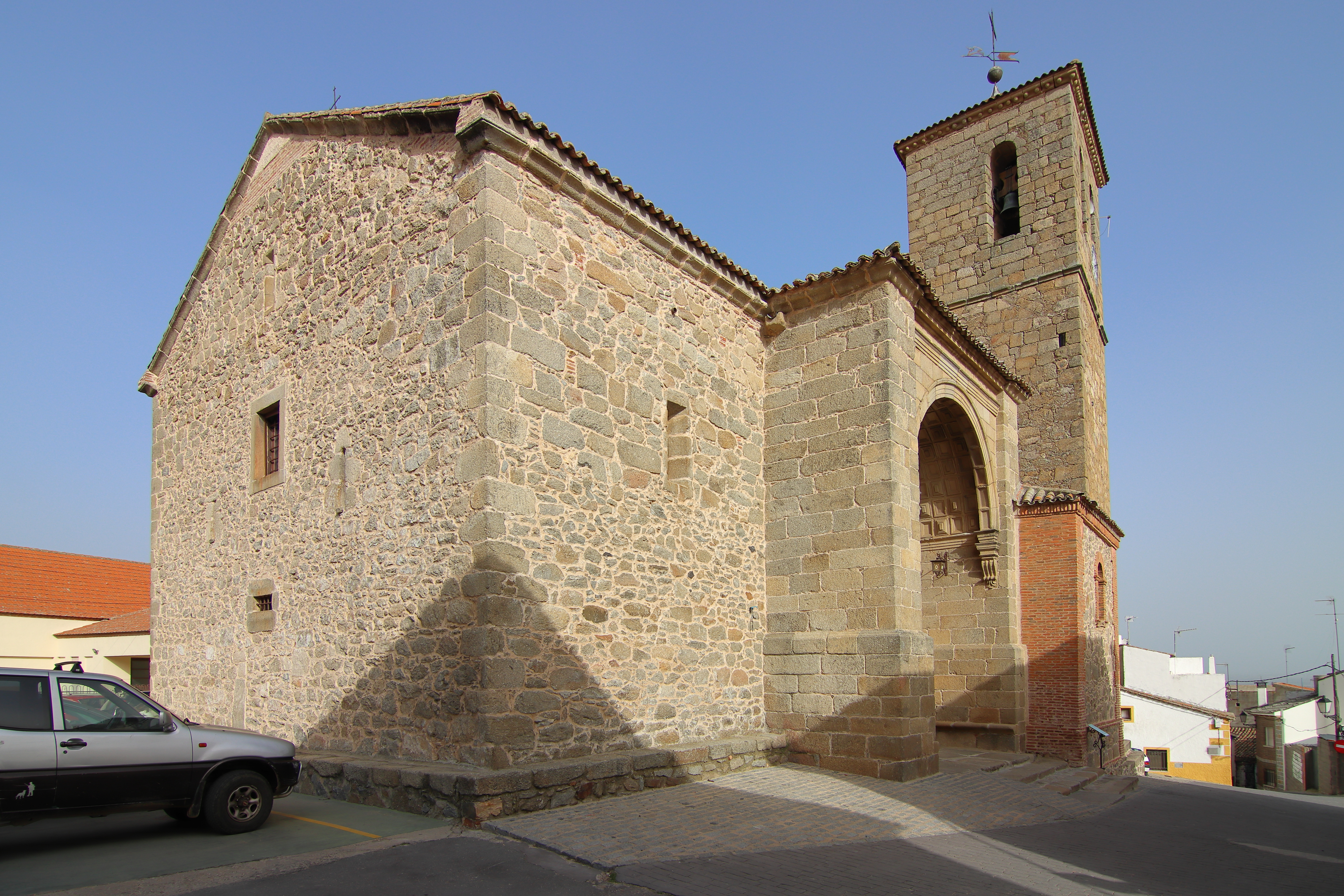 Iglesia de San Andrés, Castillo de Bayuela